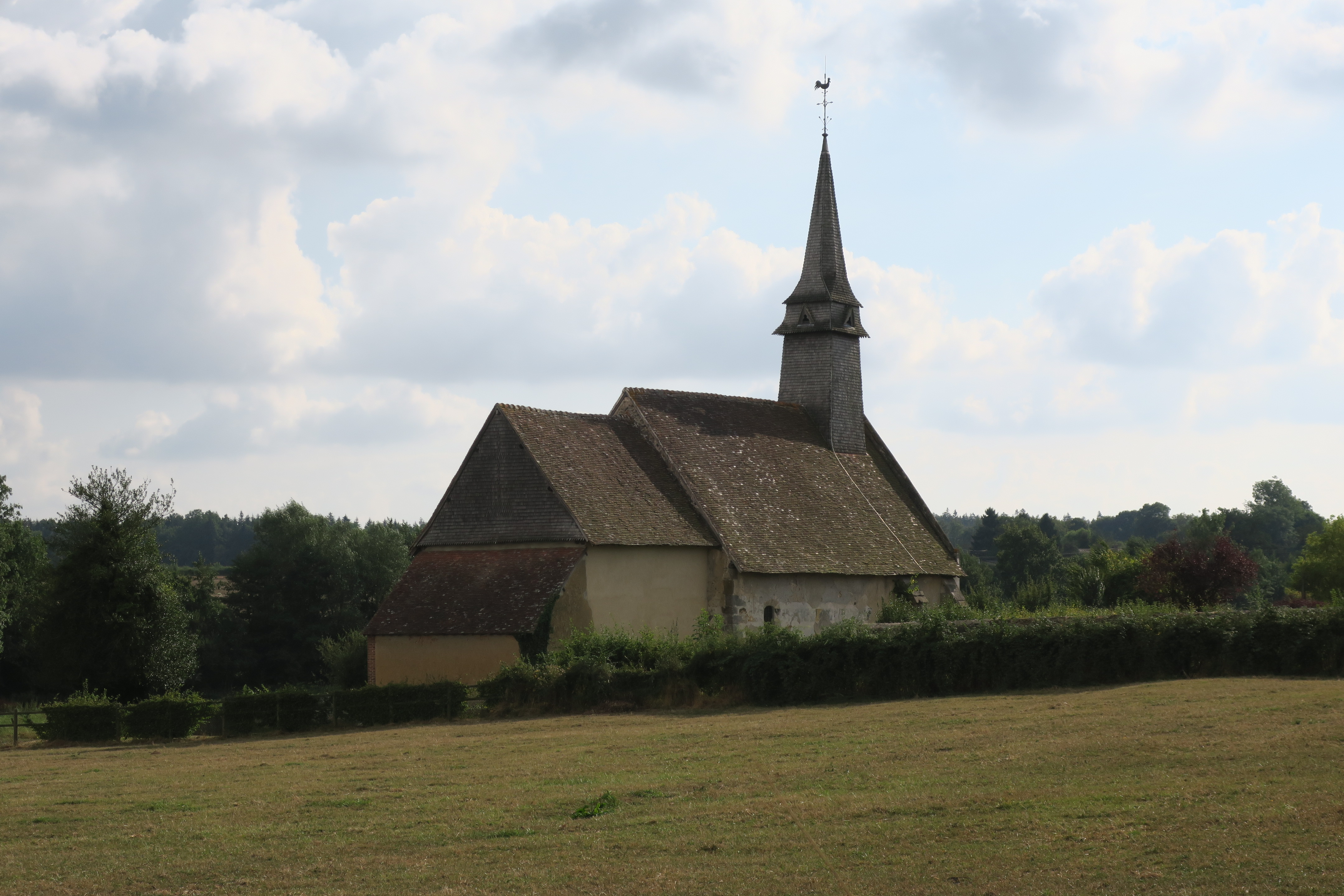 Chapelle St Pierre de Sommaire vue du Nord-est (de La Godeterie).